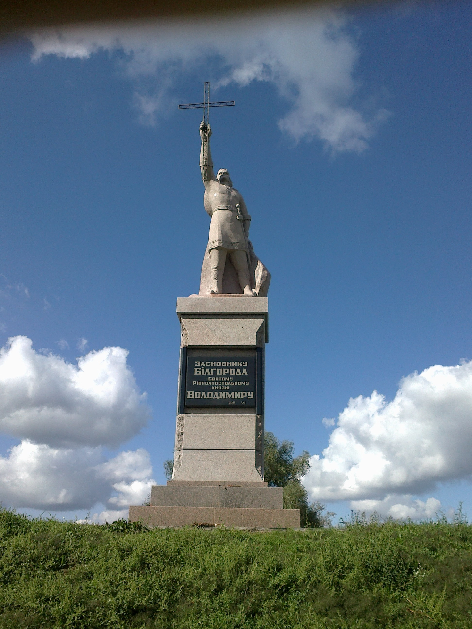 Білогородка